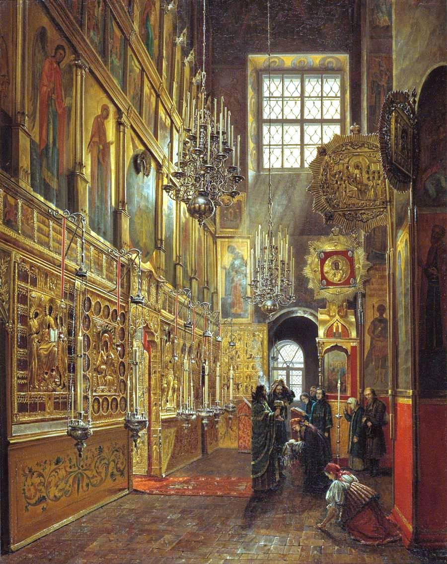 С. М. Шухвостов. «Обедня в московском Благовещенском соборе». 1857. Холст, масло. 90 × 71 см. Государственная Третьяковская галерея, Москва.